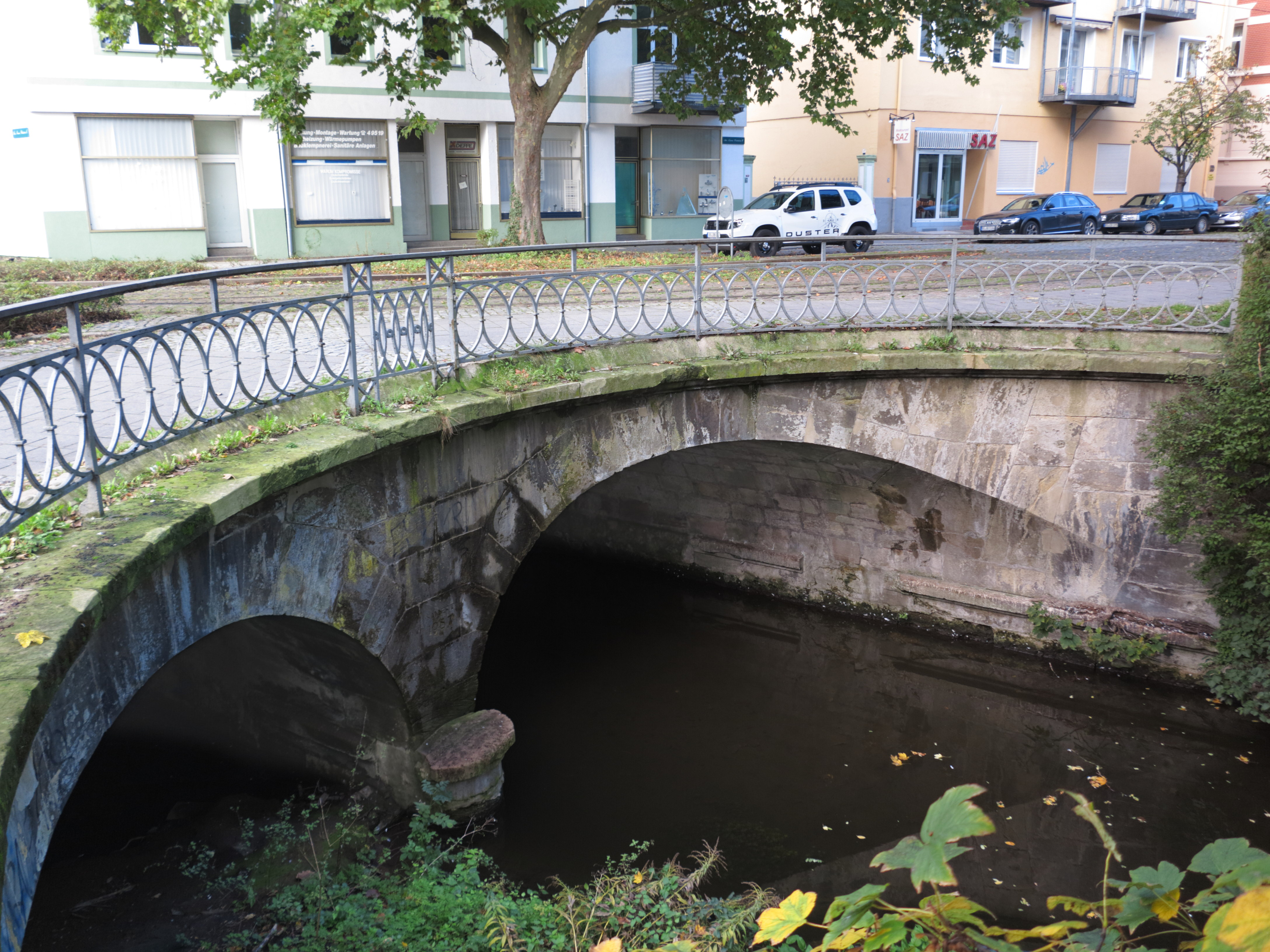 Braunschweig: die Brücke über den Neustadtmühlengraben